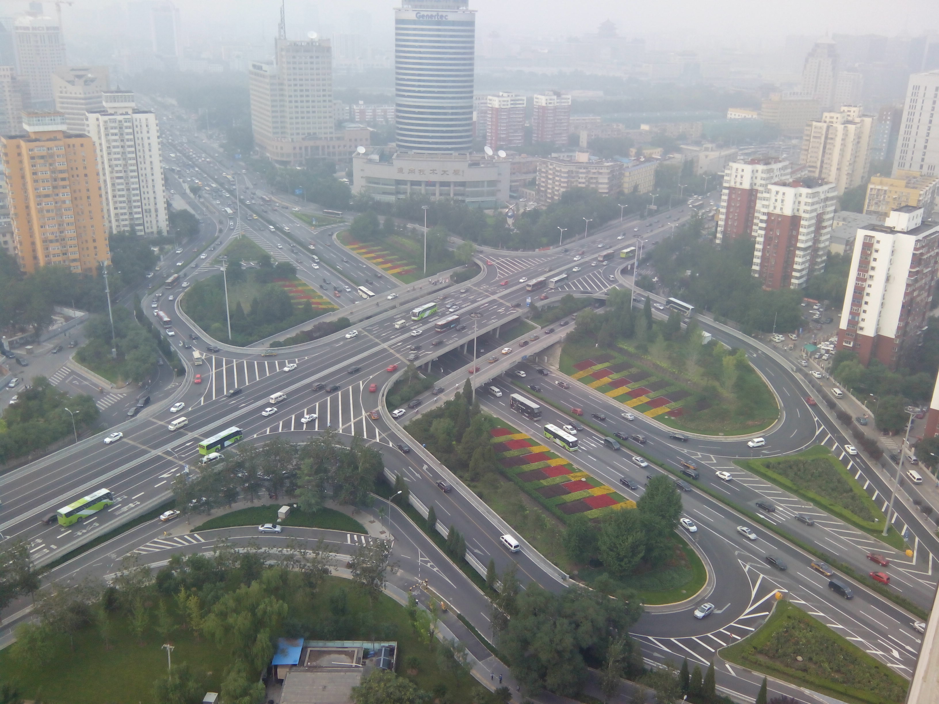 六里桥立交桥，从北京市政务服务中心顶层拍摄。